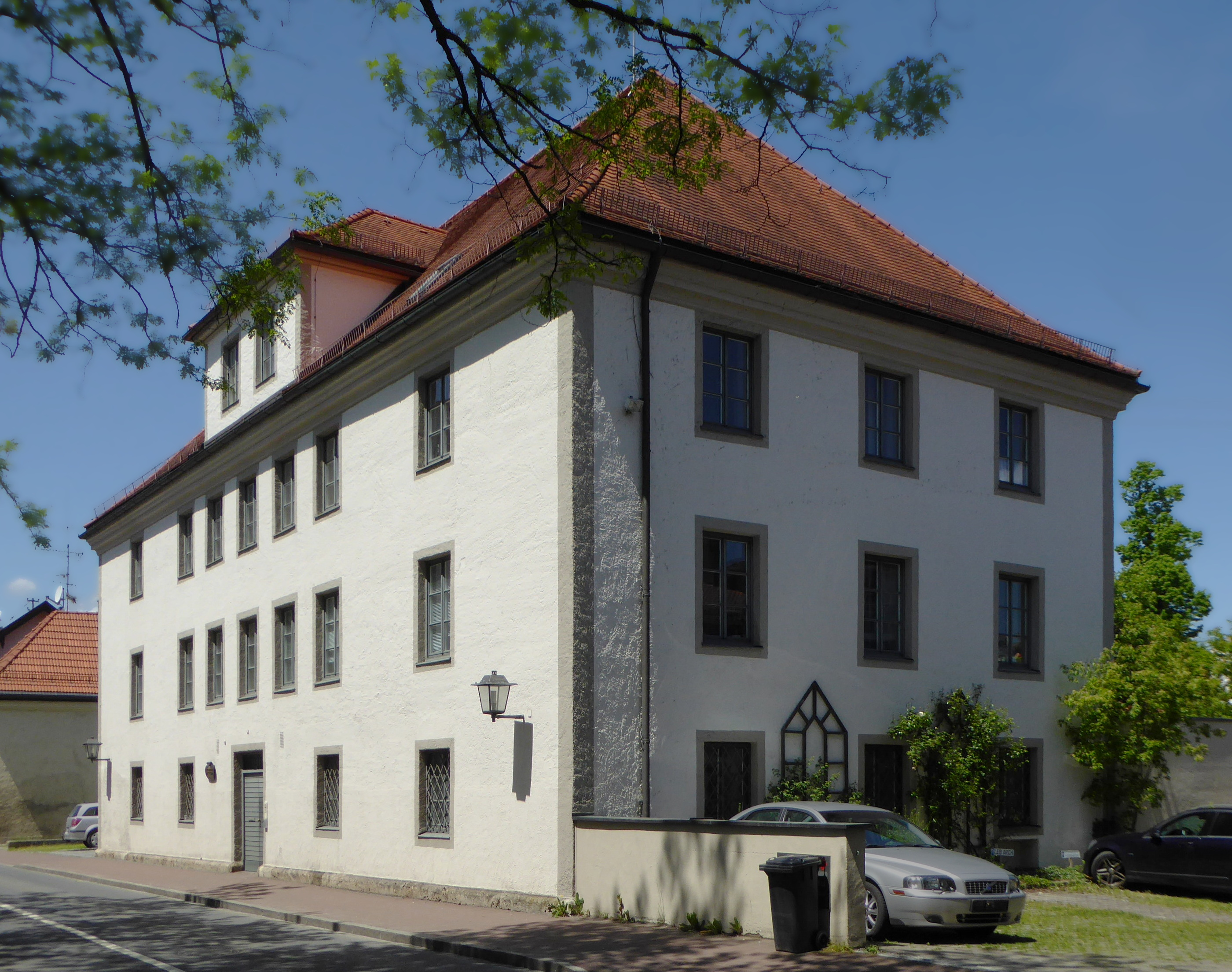 Boarisch: Da friarane Zentkastn z' Weilheim, Owane Schtot 71.